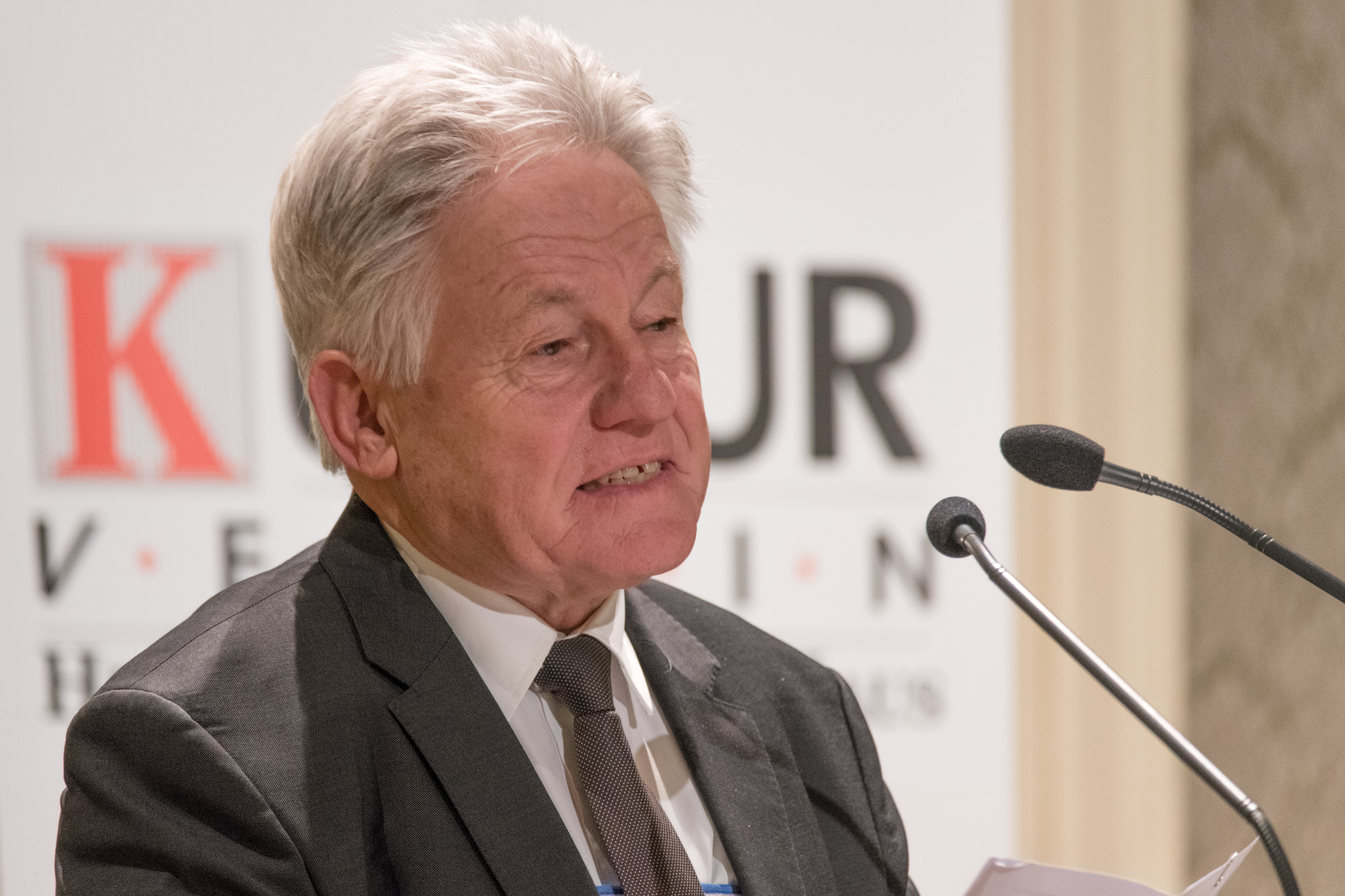 Verleihung des Heinrich-Gleißner-Preises 2018 am 14. Jänner 2019 in den Redoutensälen Linz